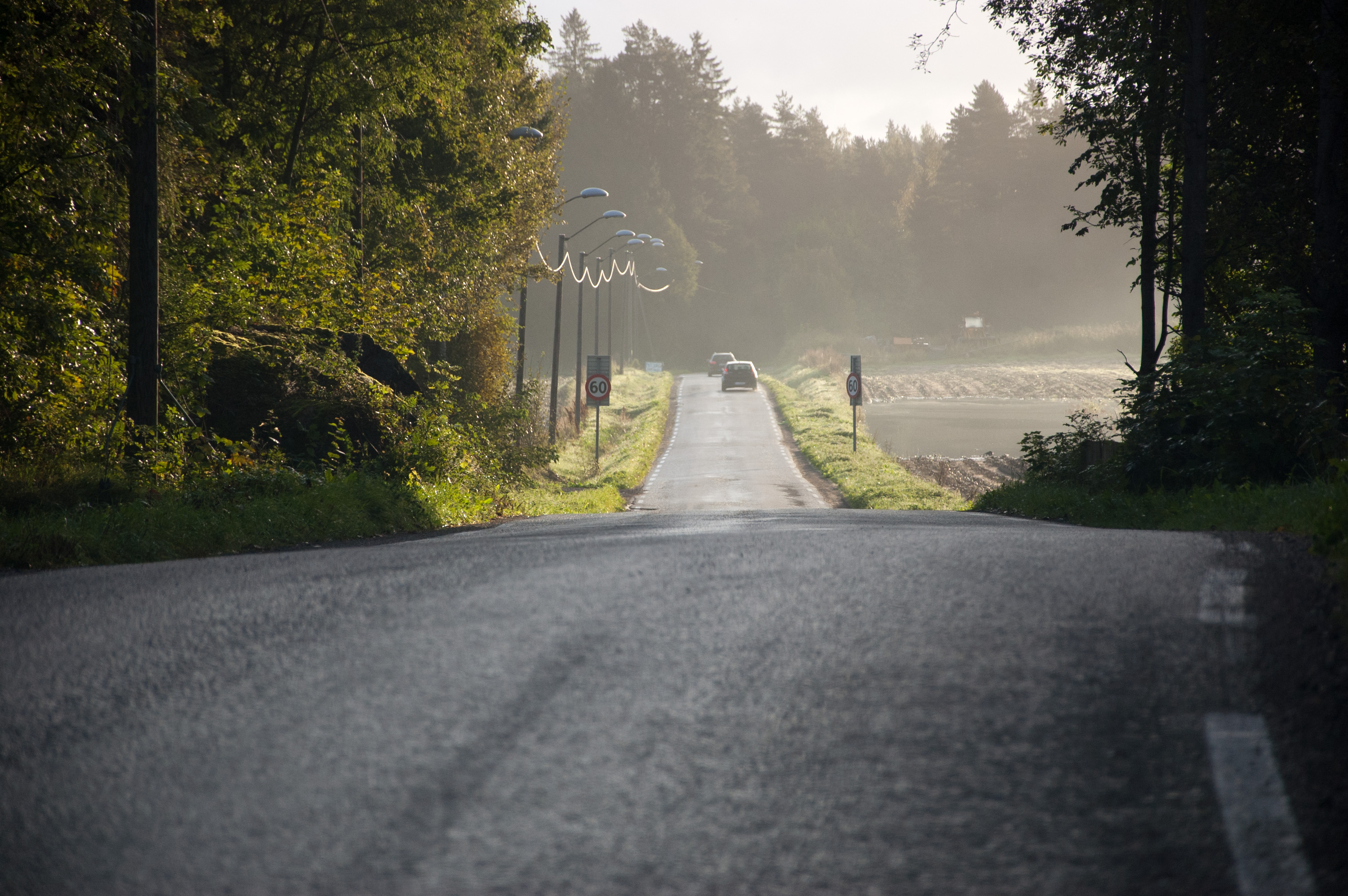 Fylkesvei 535 Innlagveien i Tønsberg, Vestfold